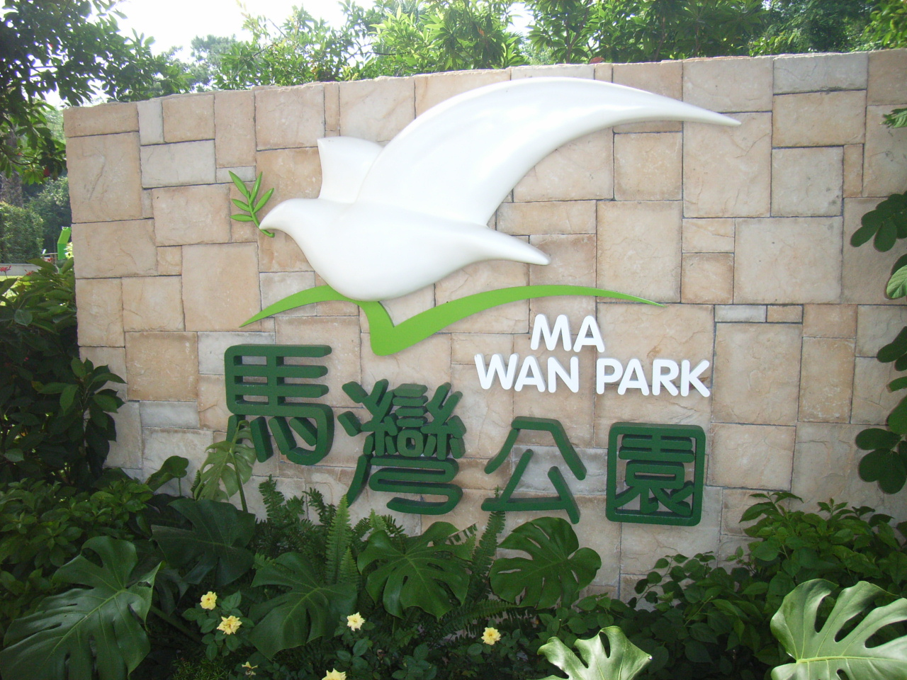 馬灣公園